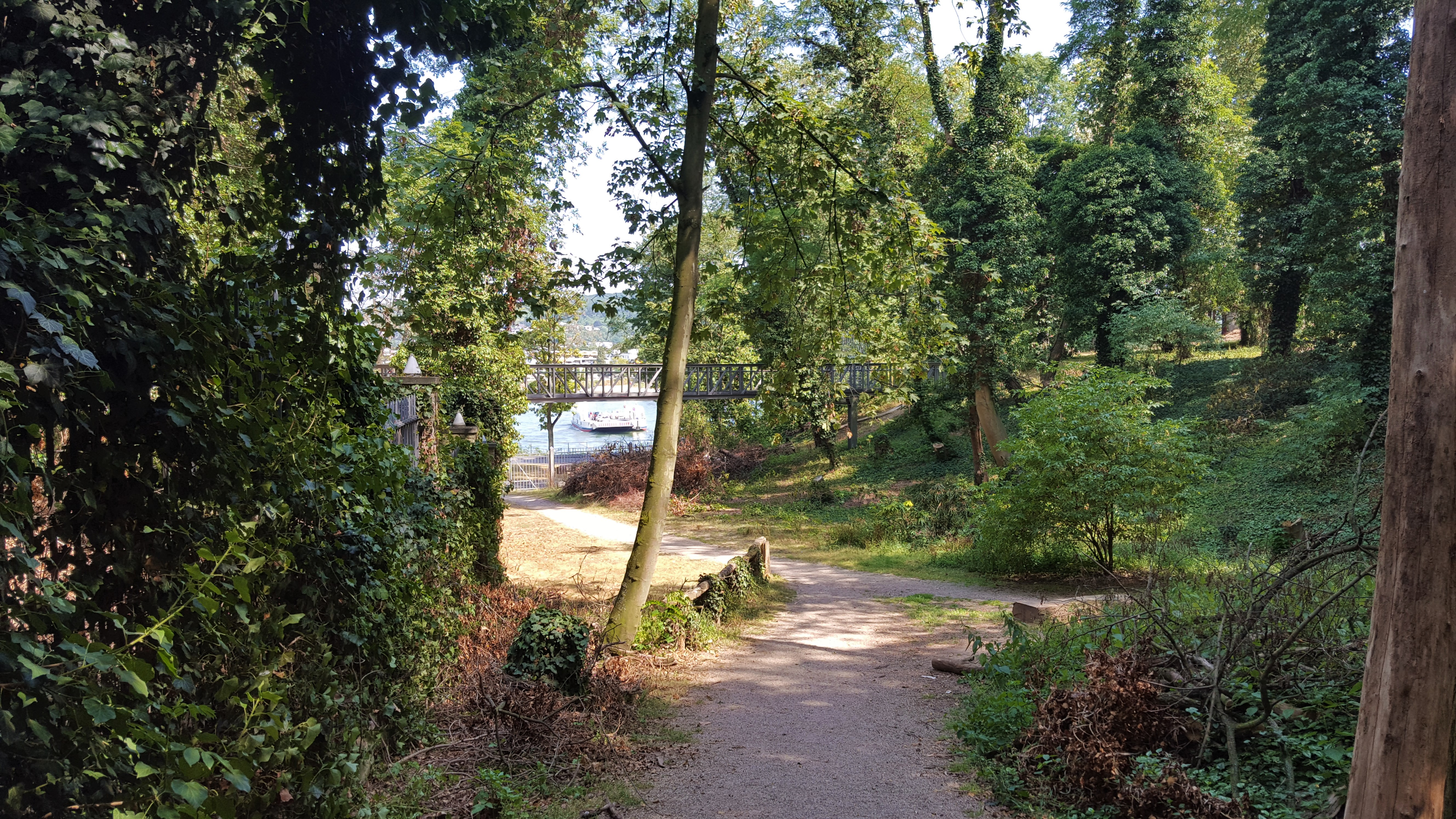 Leserpark, Bad Godesberg, Blick auf Rhein, dort das Fährschiff “Konrad Adenauer” zu sehen